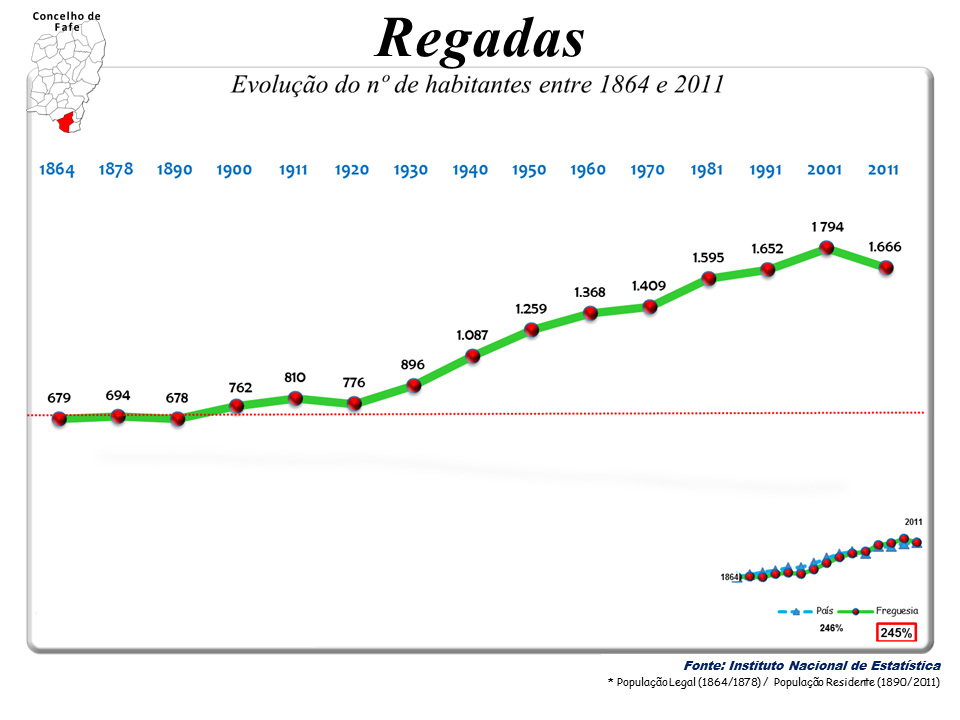 Censos 1864/2011